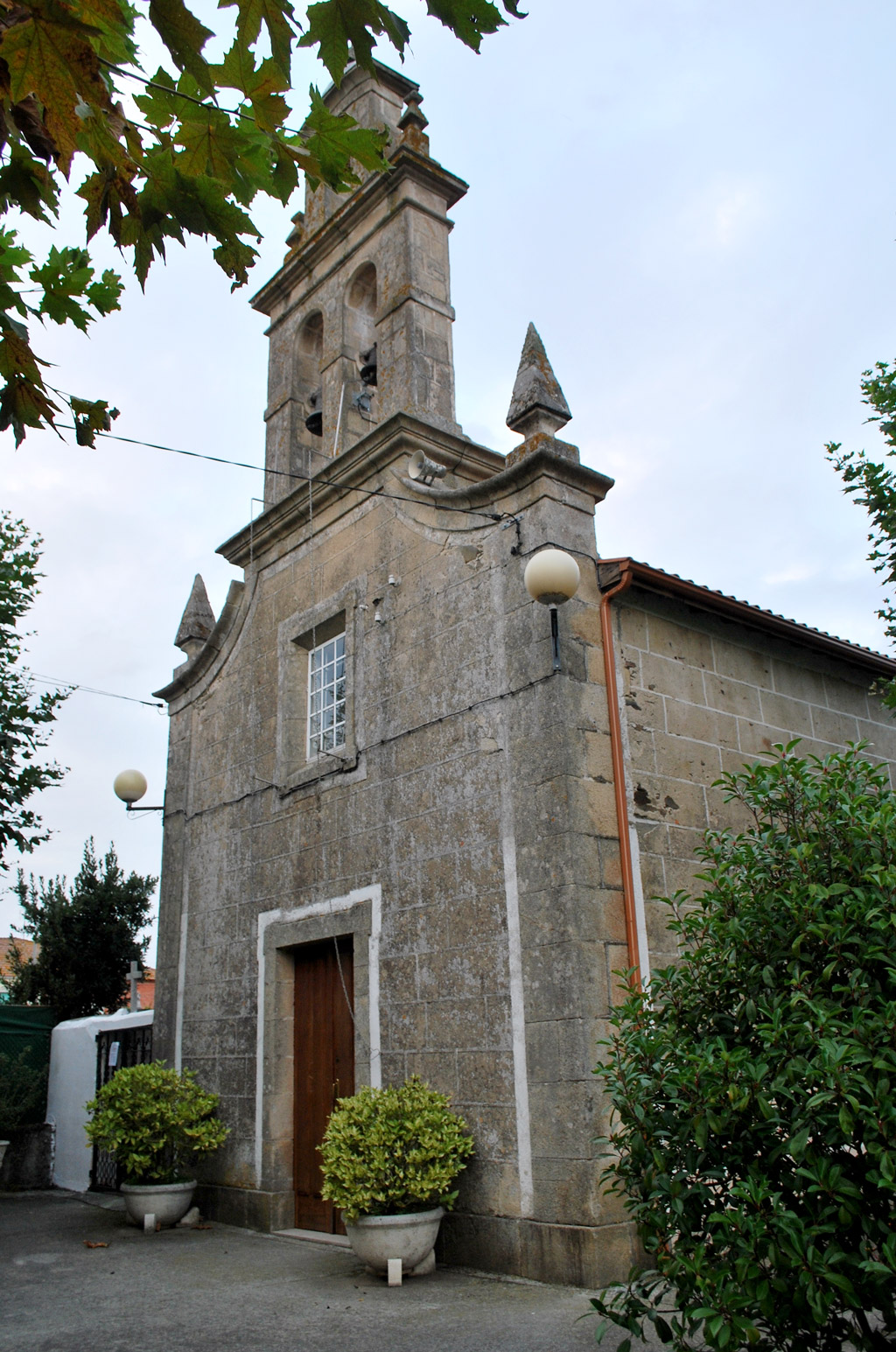 A Eirexe Piñeira, Monforte de Lemos.